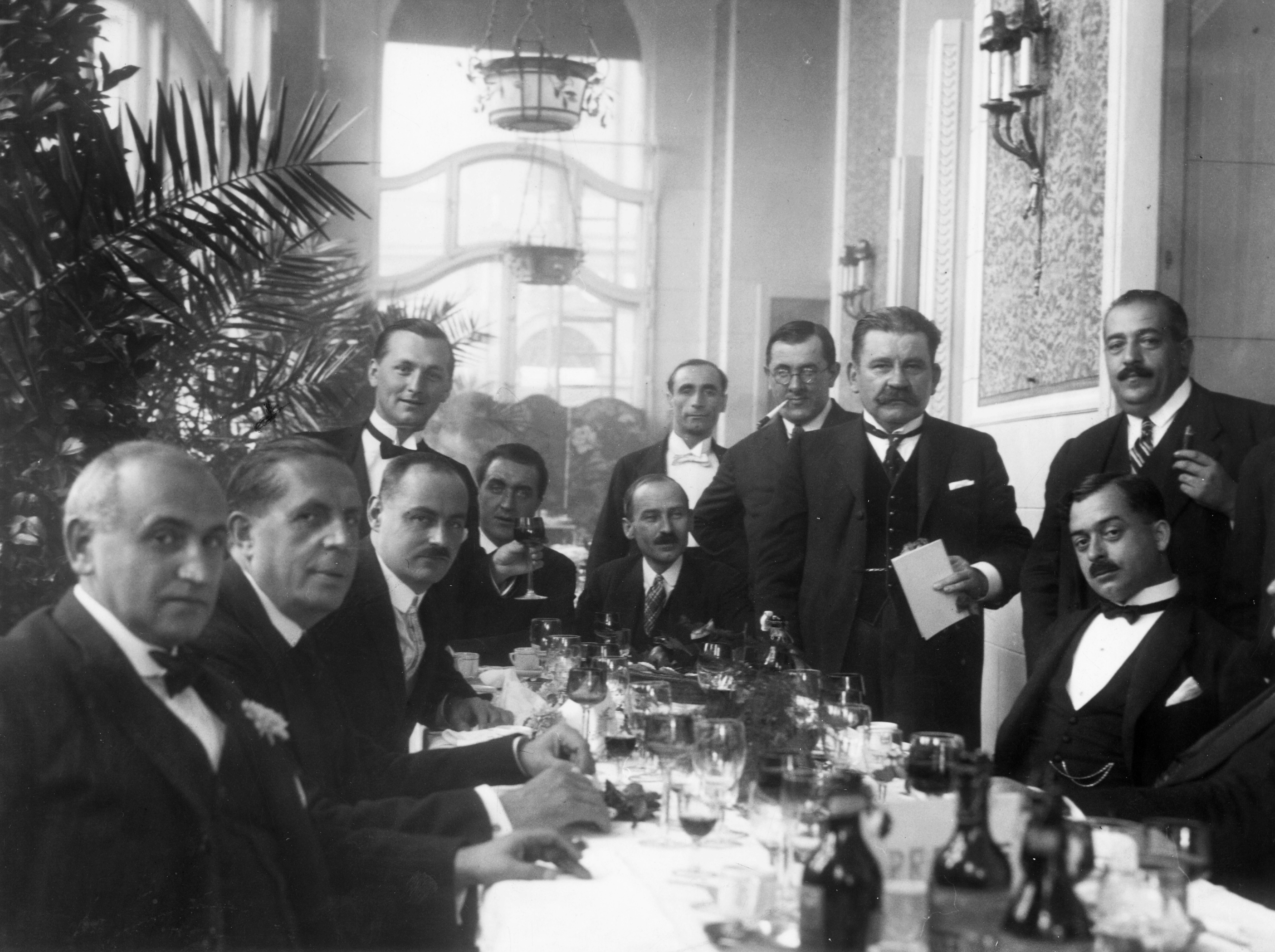 Eötvös tér, Dunapalota (korábban Ritz szálló). Location: Hungary, Budapest V. Tags: drinking, Budapest, smoking, watch chain, hotel Title: Eötvös tér, Dunapalota (korábban Ritz szálló).